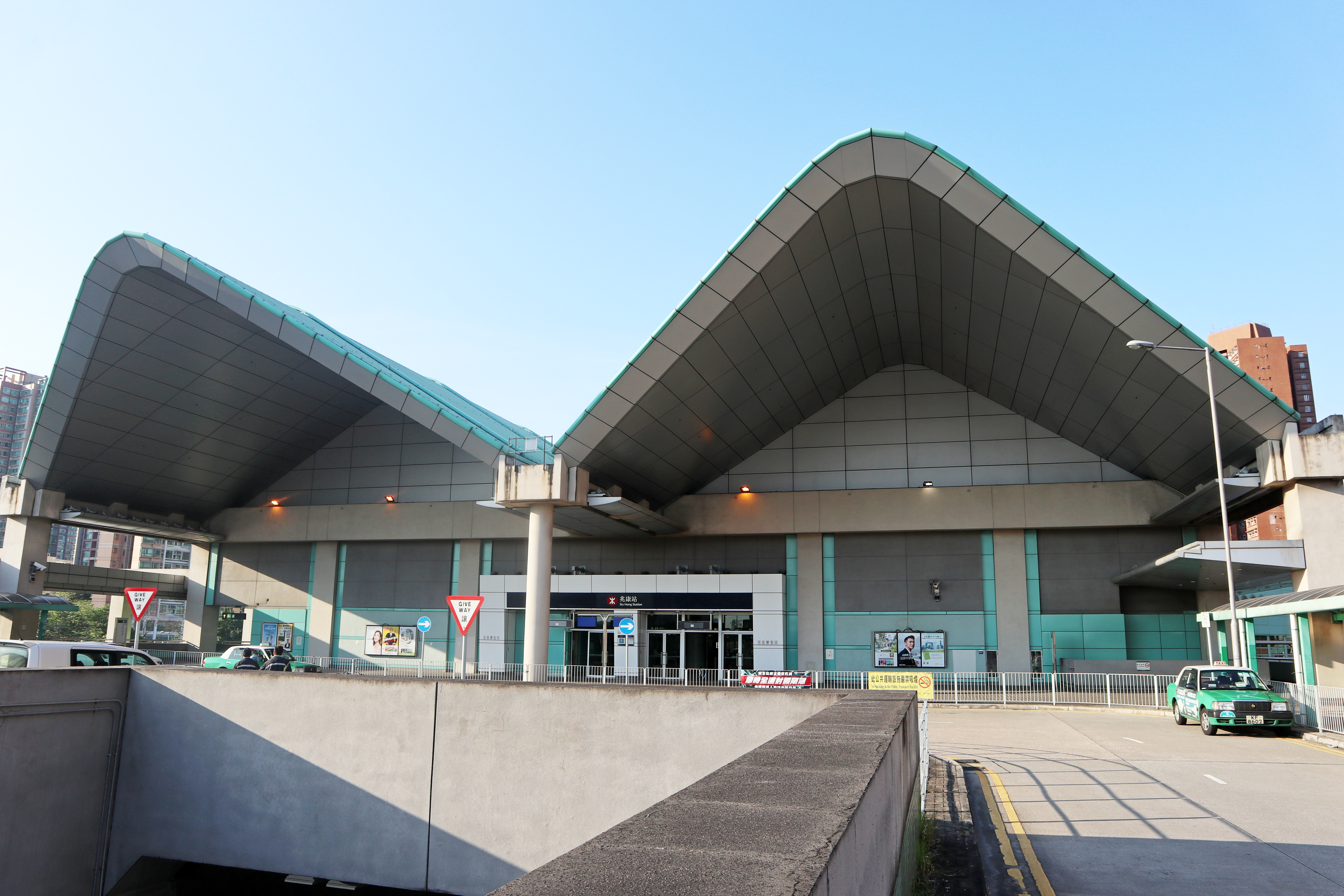 港鐵兆康站E出入口外觀